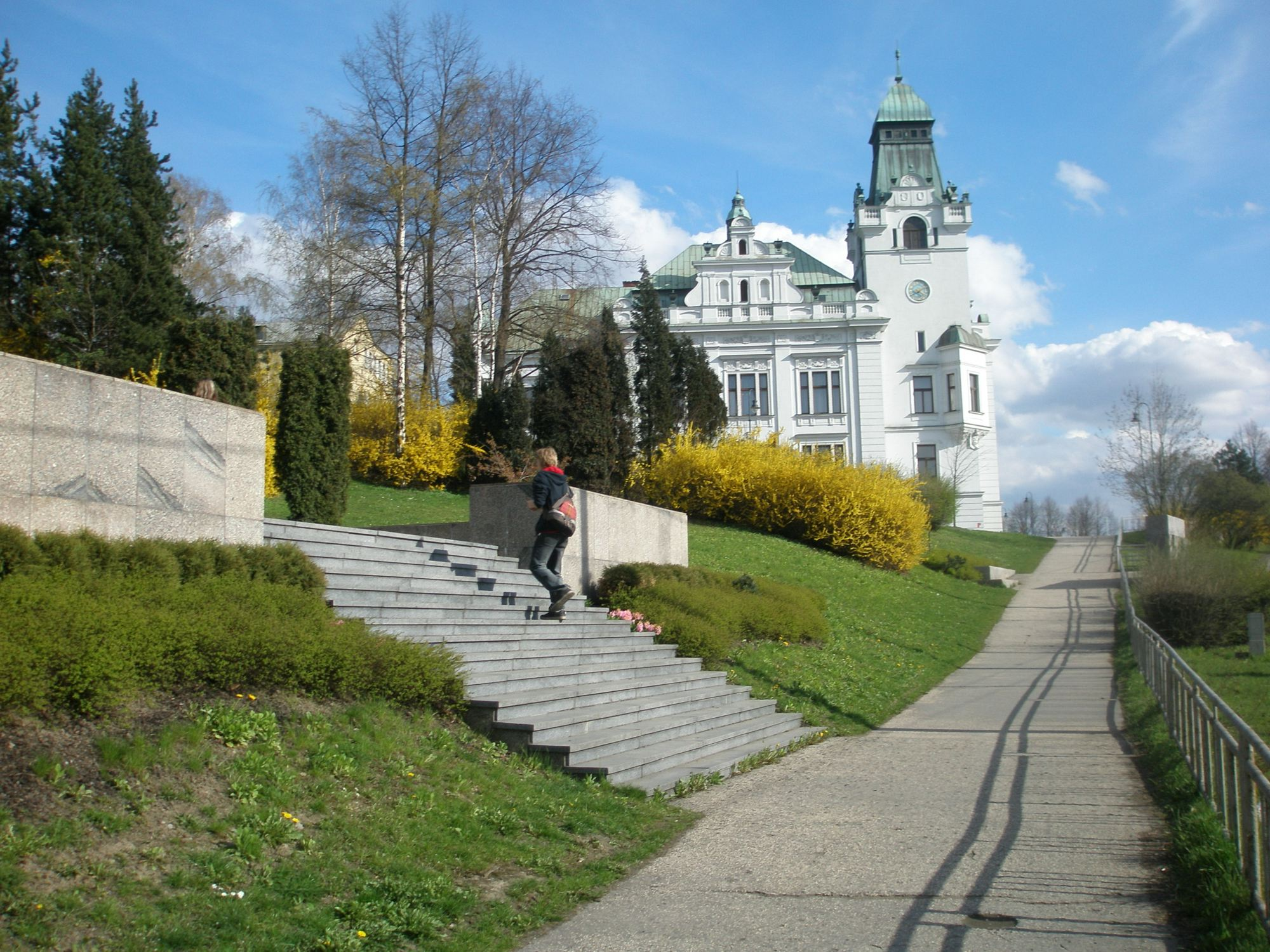 Radnice Slezske Ostravy